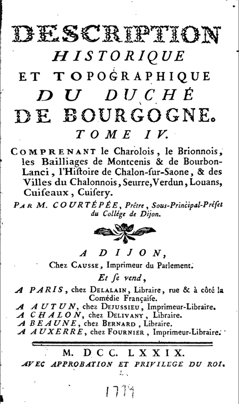 Couverture de livre